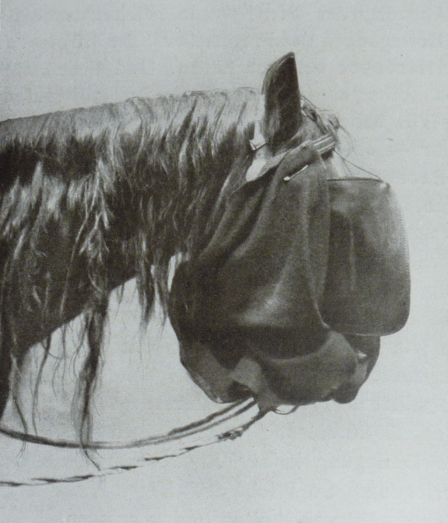 Der kluge Hans mit Scheuklappe